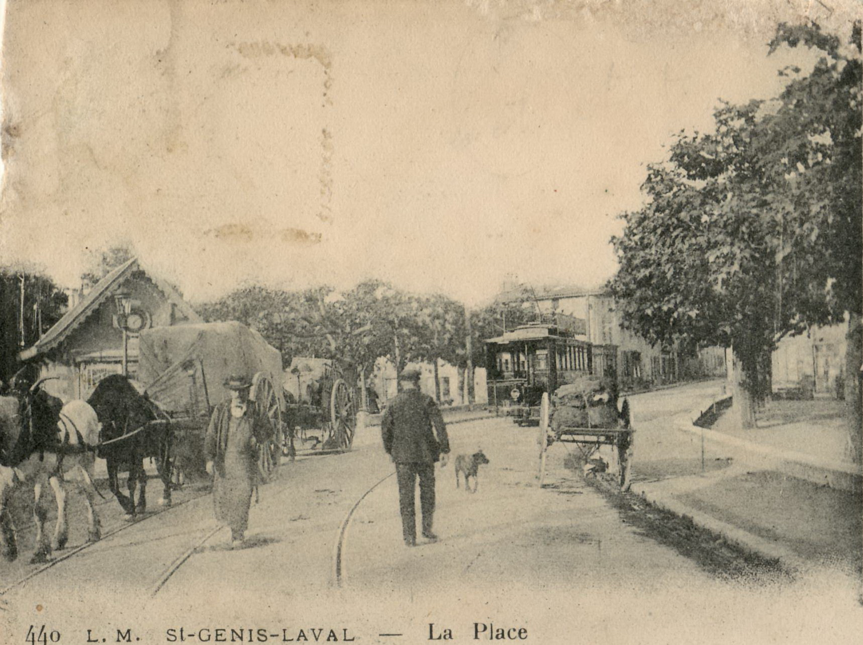 Détail de la carte postale ancienne éditée par L. M., n°440 :SAINT-GENIS-LAVAL - La Place